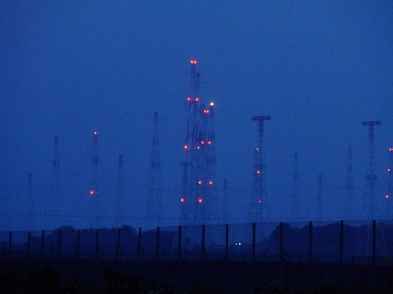 03issoudun rideaux E nuit.JPG